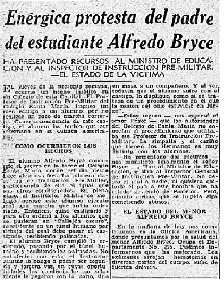 Columna del diario peruano El Comercio (año 1958) sobre el estado de salud de Alfredo Bryce.